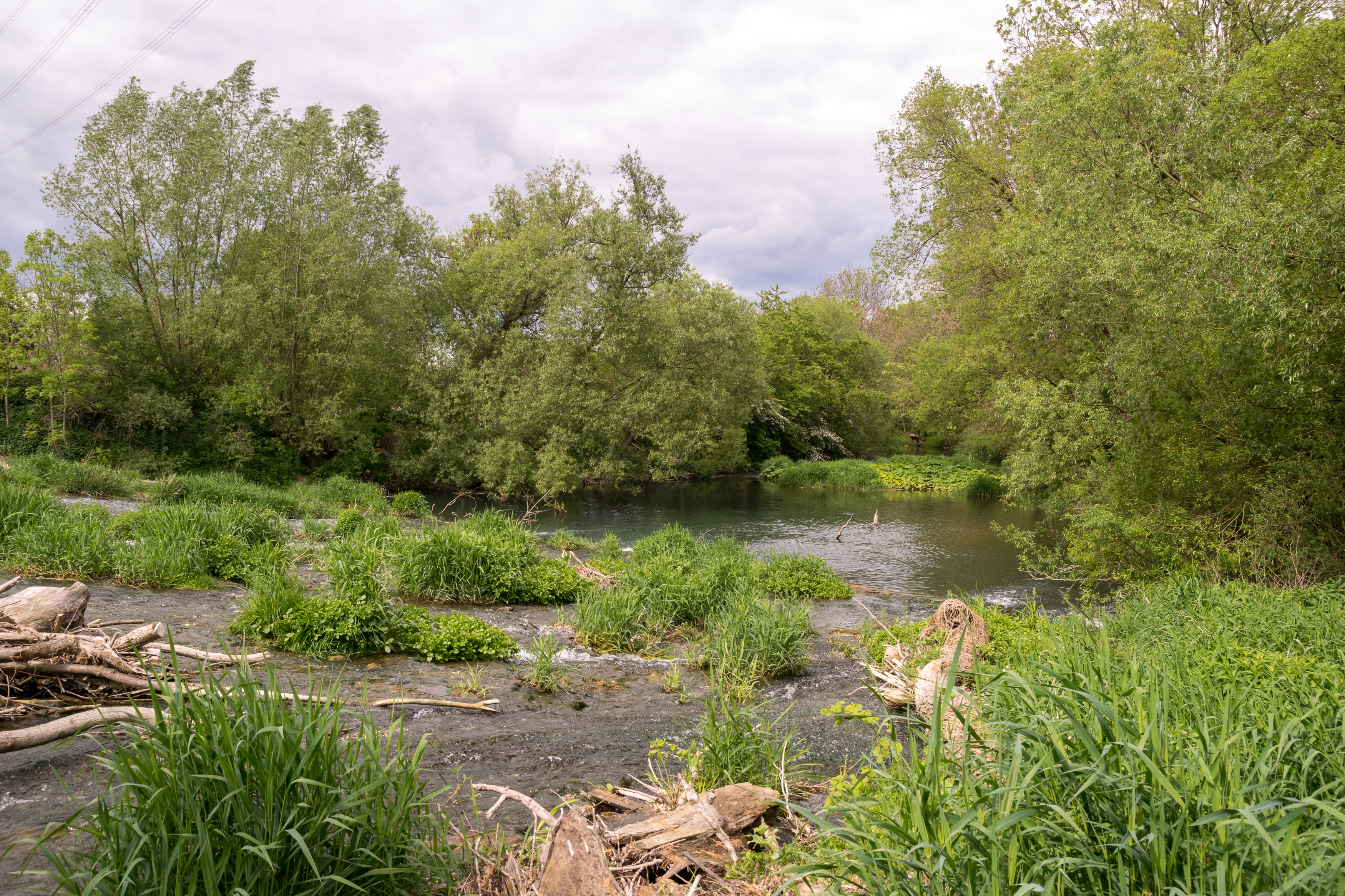 Alme bei Barkhausen im LSG Fließgewässer und Auen, Kreis Paderborn